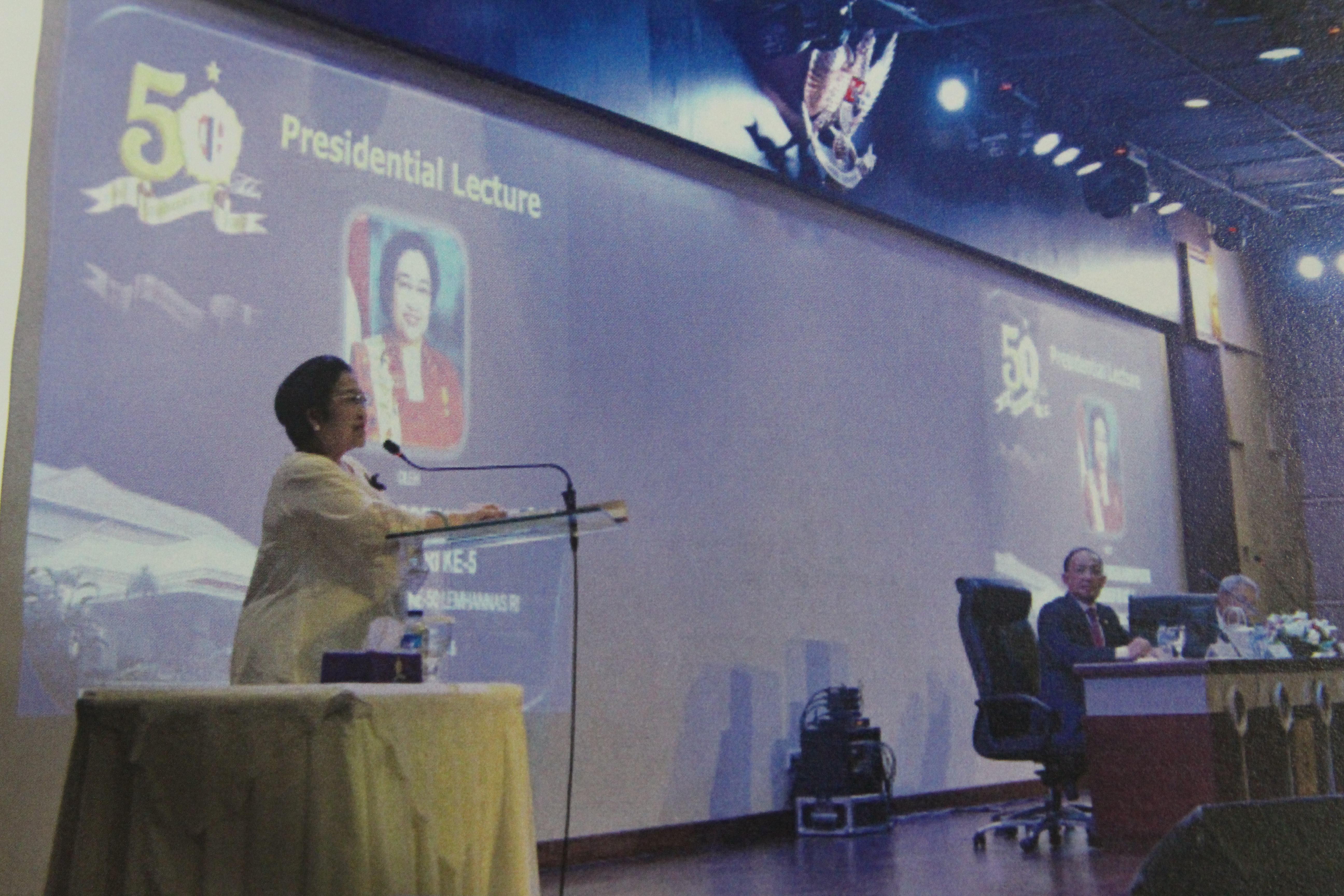 Presidential Lecture Megawati